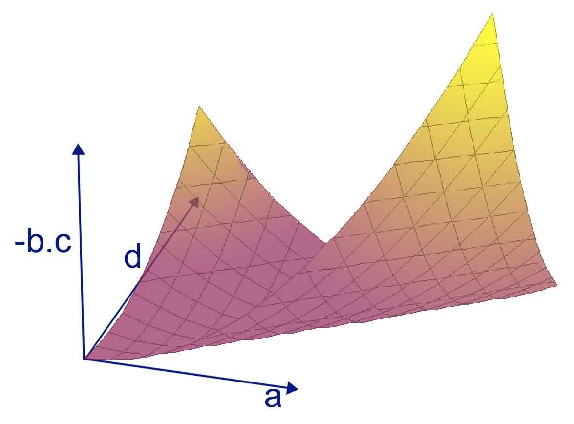 Summary Adhérence des endomorphismes non diagonalisables dans le cas de la dimension 2.Jean-Luc W 23 avril 2006 à 17:50 (CEST) Licensing